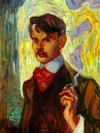 Self-portrait